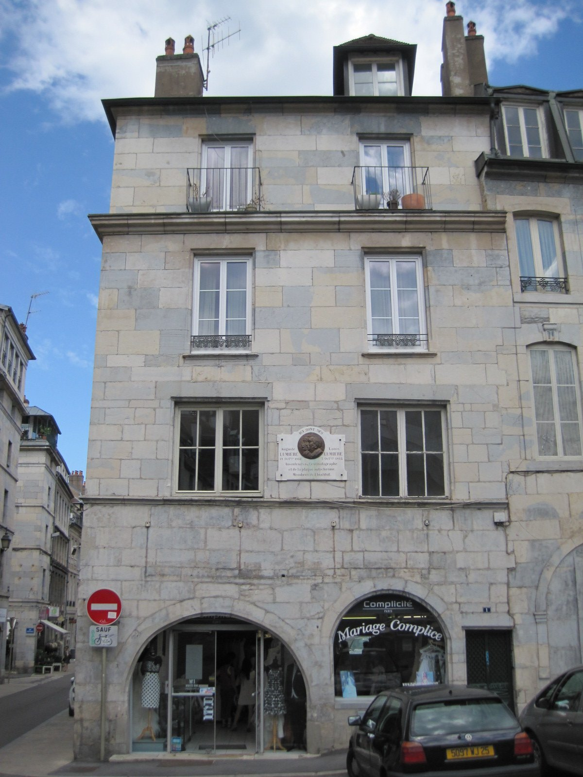 Maison de naissance des Frères Lumière - Place Victor Hugo à Besançon en Franche Comté